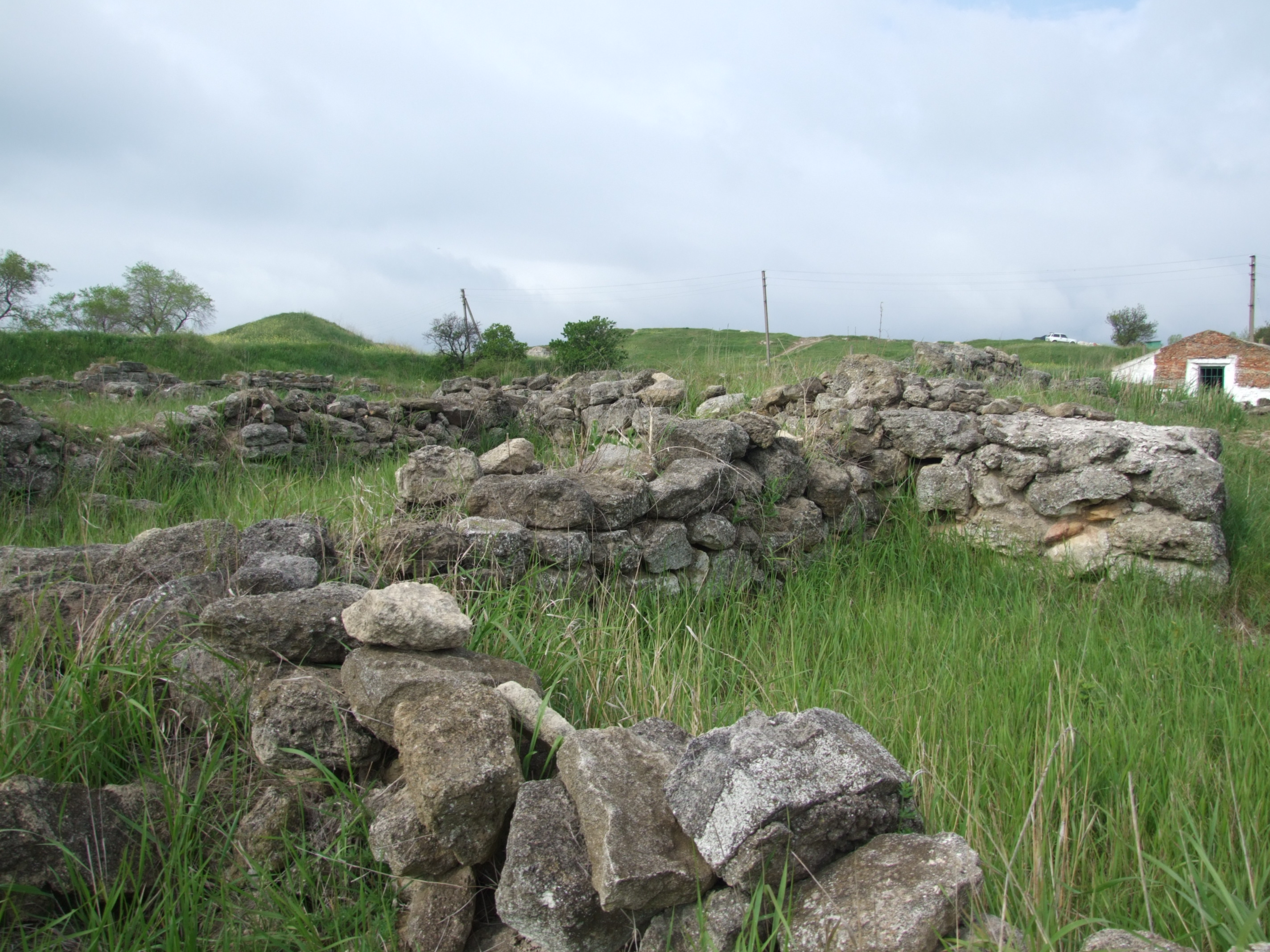 Археологічний комплекс «Стародавнє місто Мірмекій»